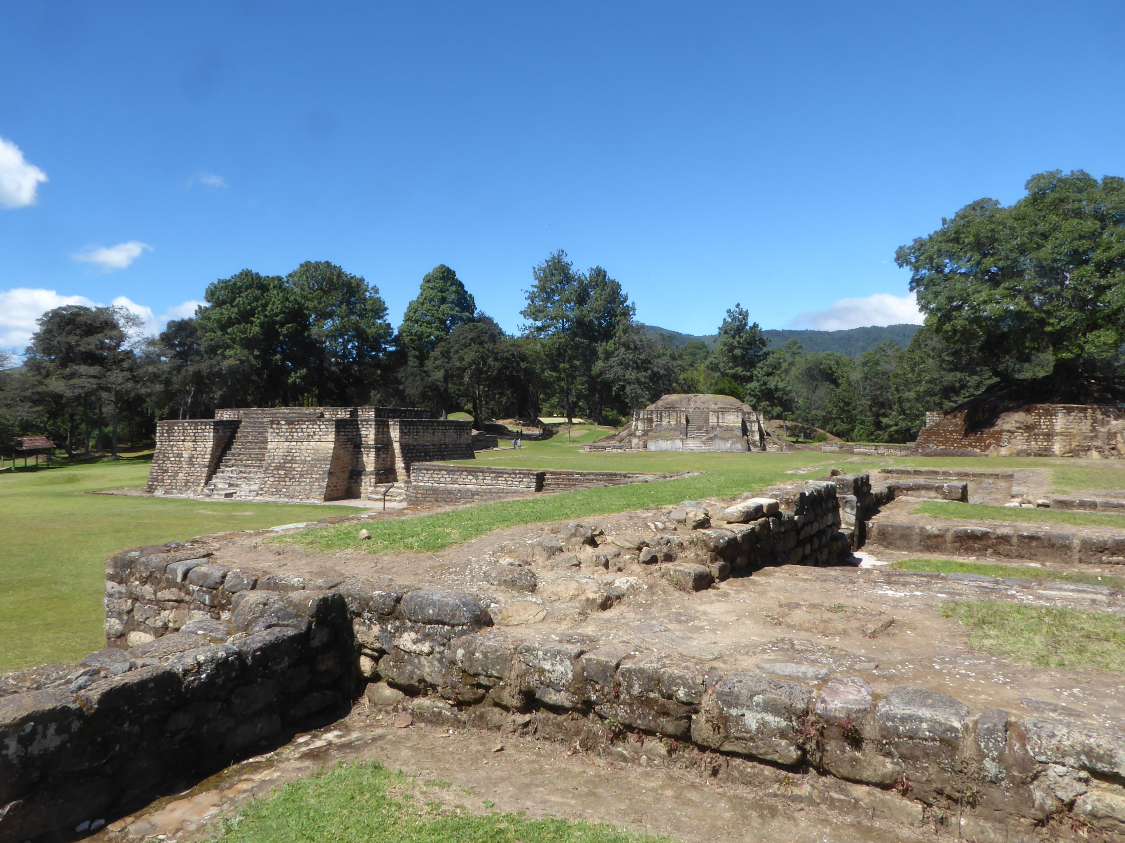 Iximché (5)